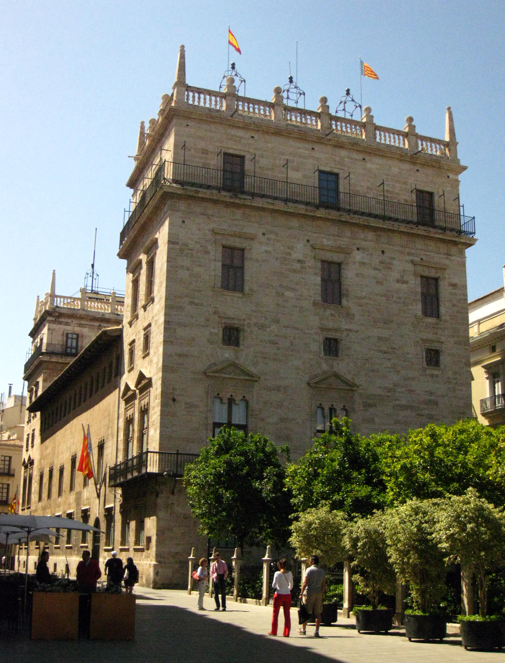 Palau de la Generalitat (València)